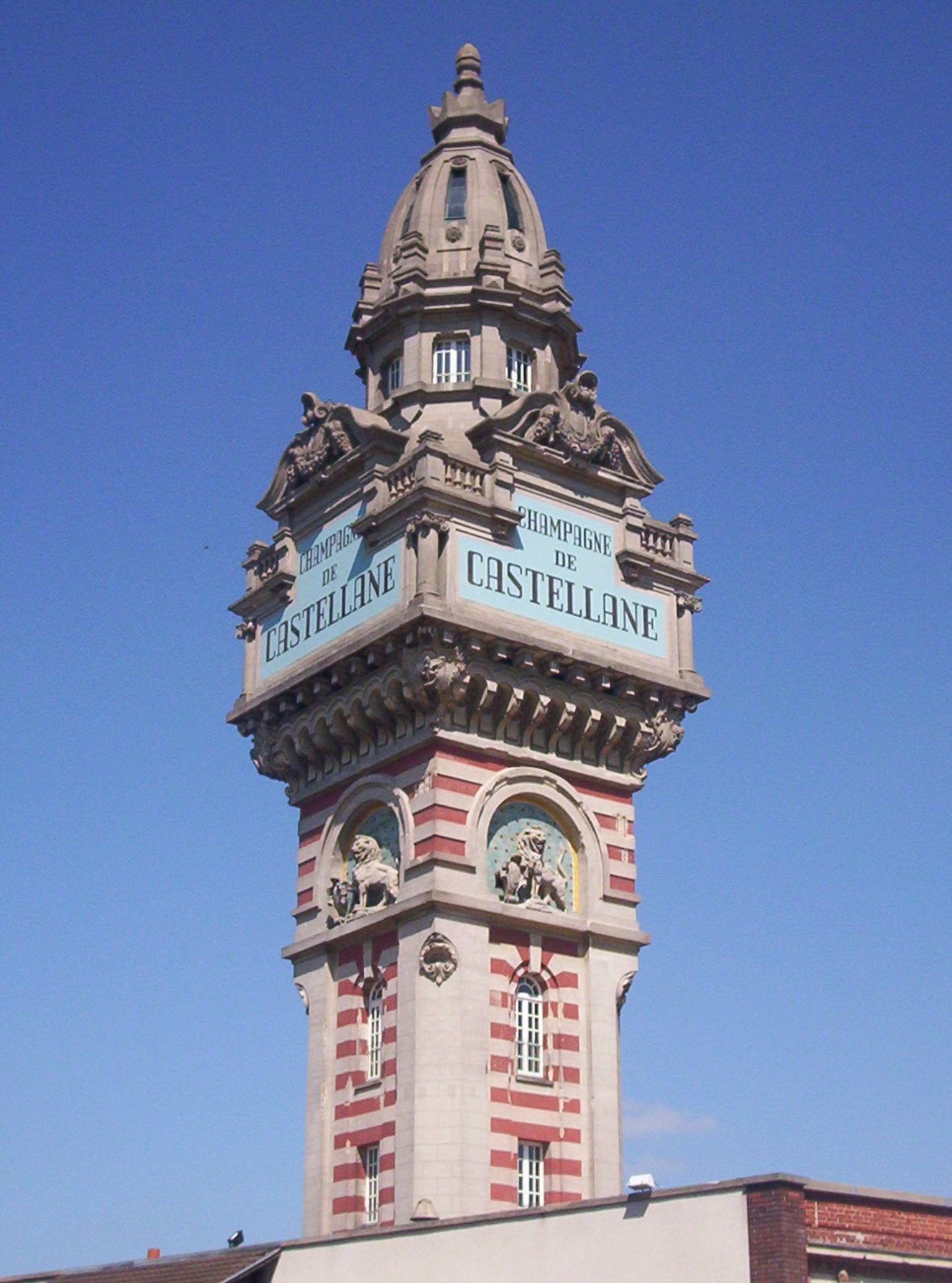 Tour de la maison de champagne De Castellane, Épernay (Marne, France).